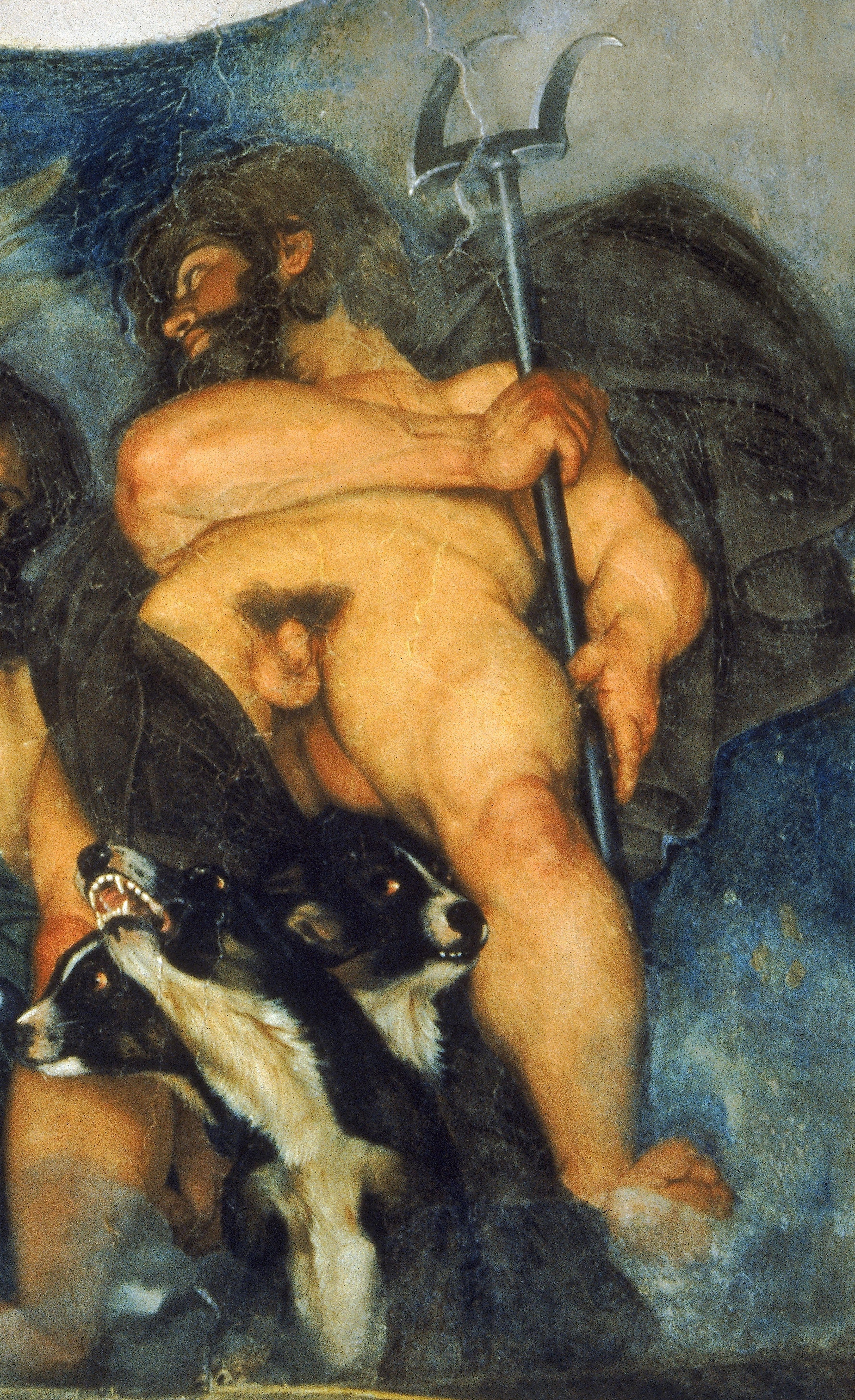 Il dio Plutone dipinto da Caravaggio, dettaglio dall'affresco Giove, Nettuno e Plutone (1597)